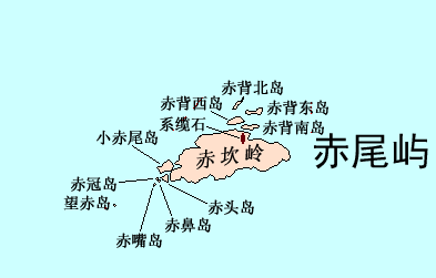 中文（中国大陆）: 赤尾屿标准地理名称